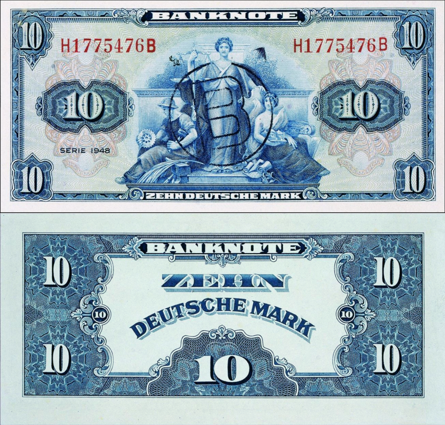 10 DM Geldschein (Serie 1) mit Berlin-Stempel, - (Serie I BdL )